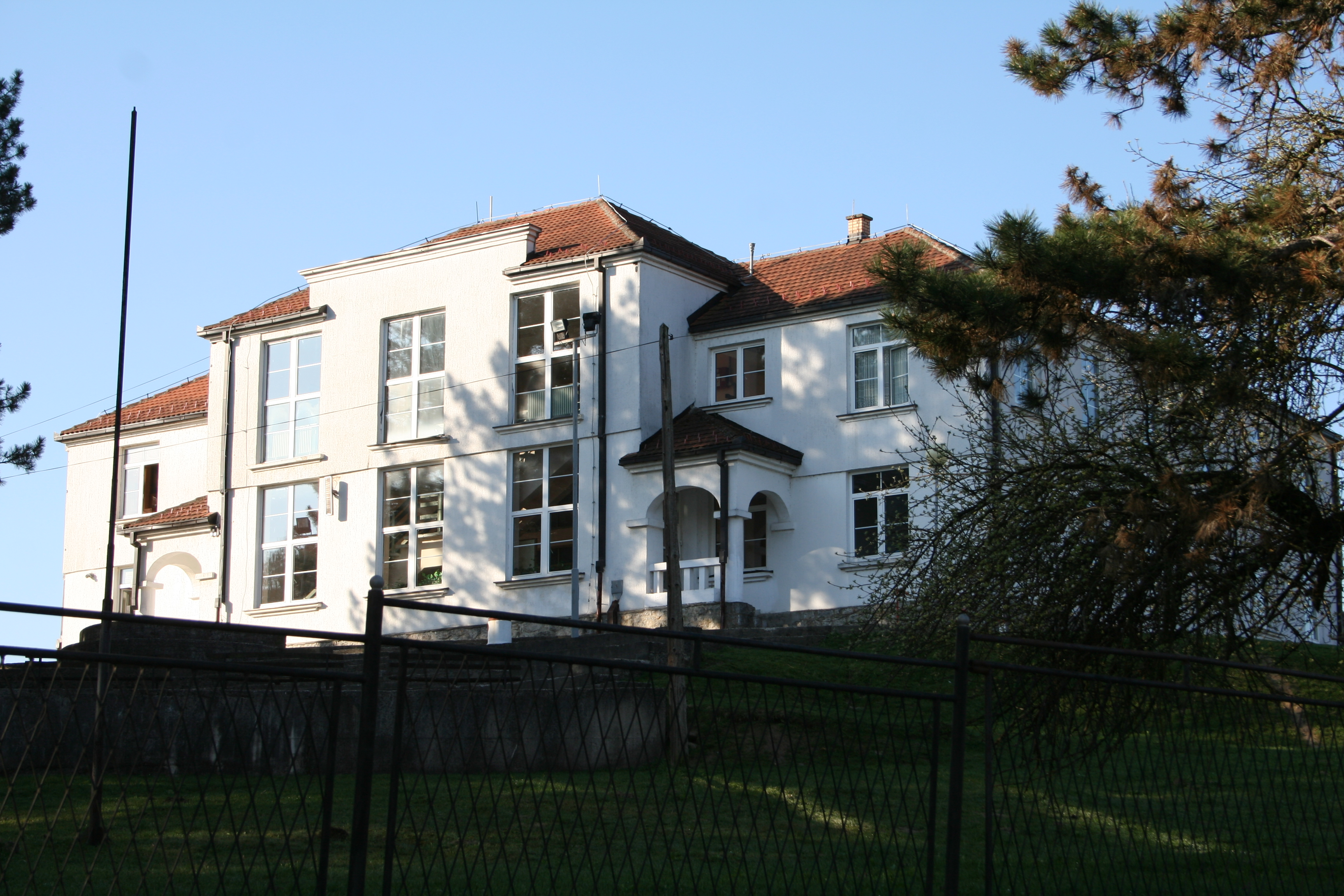 Zgrada škole, Kamenica